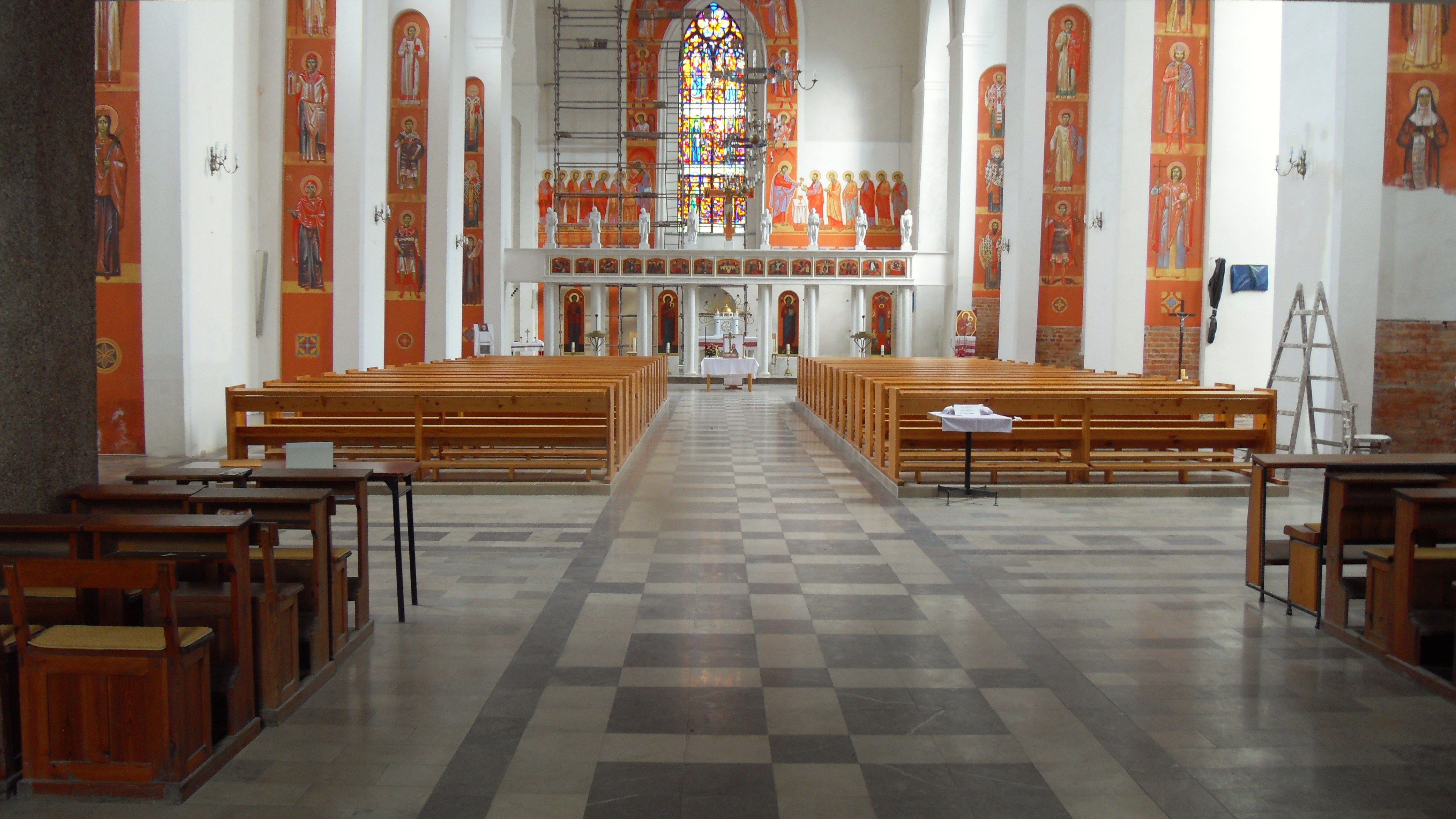 Gdańsk Stare Miasto, ul. Zaułek św. Bartłomieja 1 - Konkatedra greckokatolicka św. Bartłomieja i Opieki Najświętszej Bogurodzicy, 1486-1494, po 1945